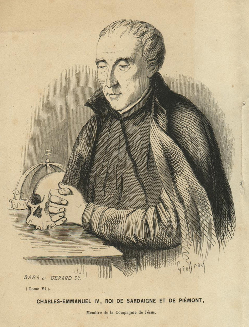 Carlo Emanuele IV di Savoia (1751-1819), re di Sardegna, in abito gesuita (incisione di Nicolas Charles Geoffroy)